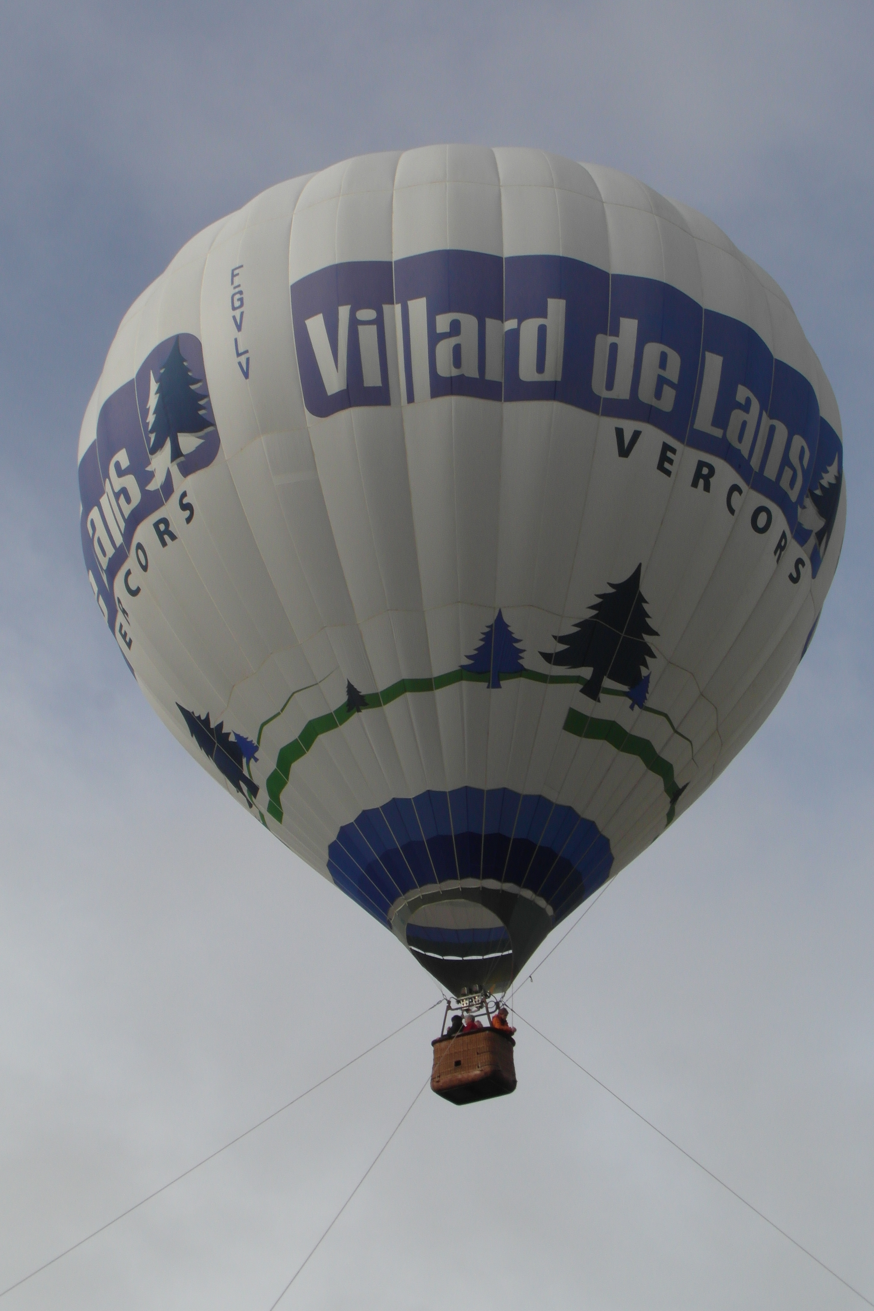 Mongolfière Villard de Lans